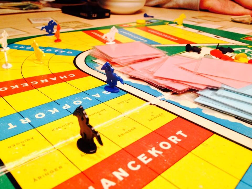 Foto af Derby brætspillet